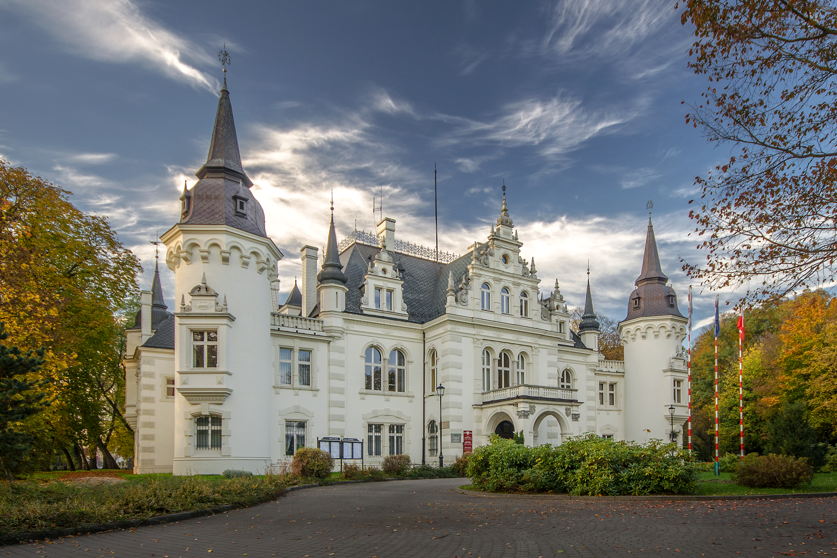 Jelcz-Laskowice, Pałac Sauermów, ob. UMiG, 1886